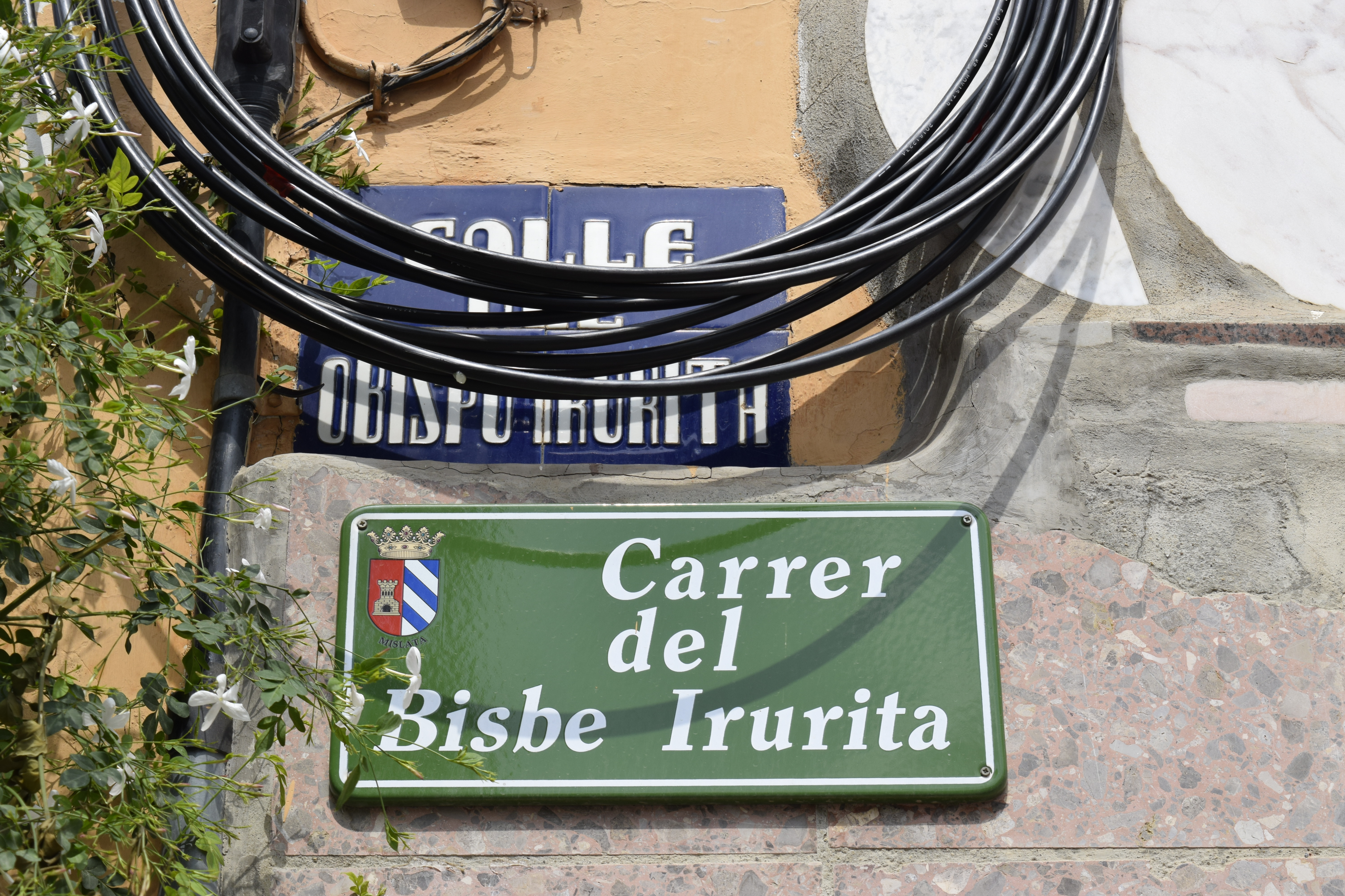 Calle dedicada al Obispo mártir, Manuel Irurita, en Mislata